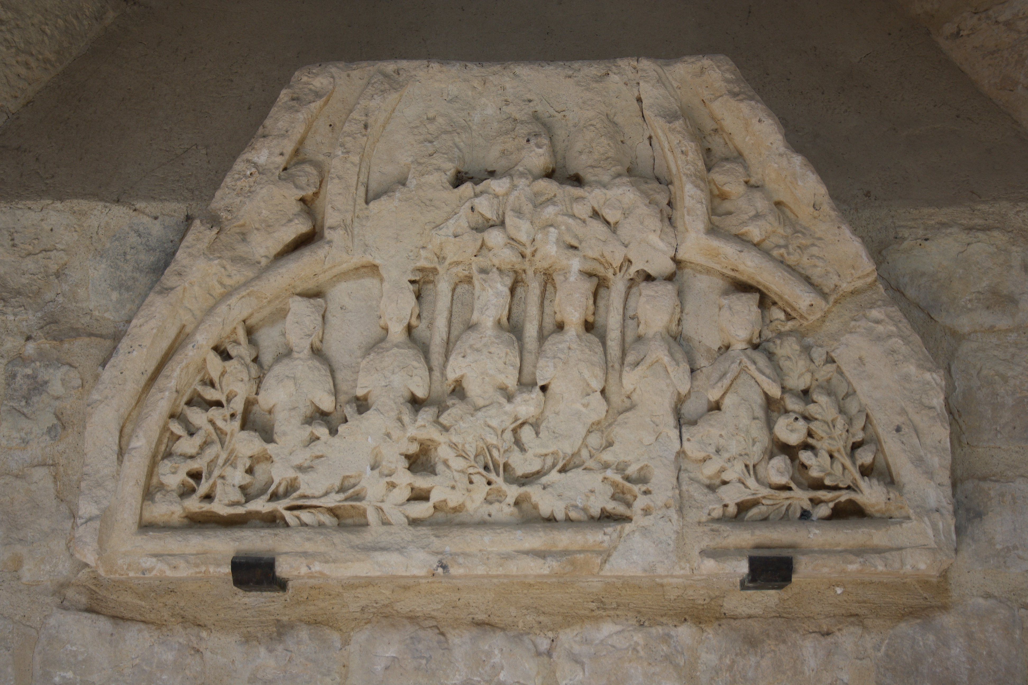 Katholische Pfarrkirche Saint-Éliphe in Rampillon, einer Gemeinde im Département Seine-et-Marne (Île-de-France), Relief aus dem 13./14. Jh., Darstellung: Paradies